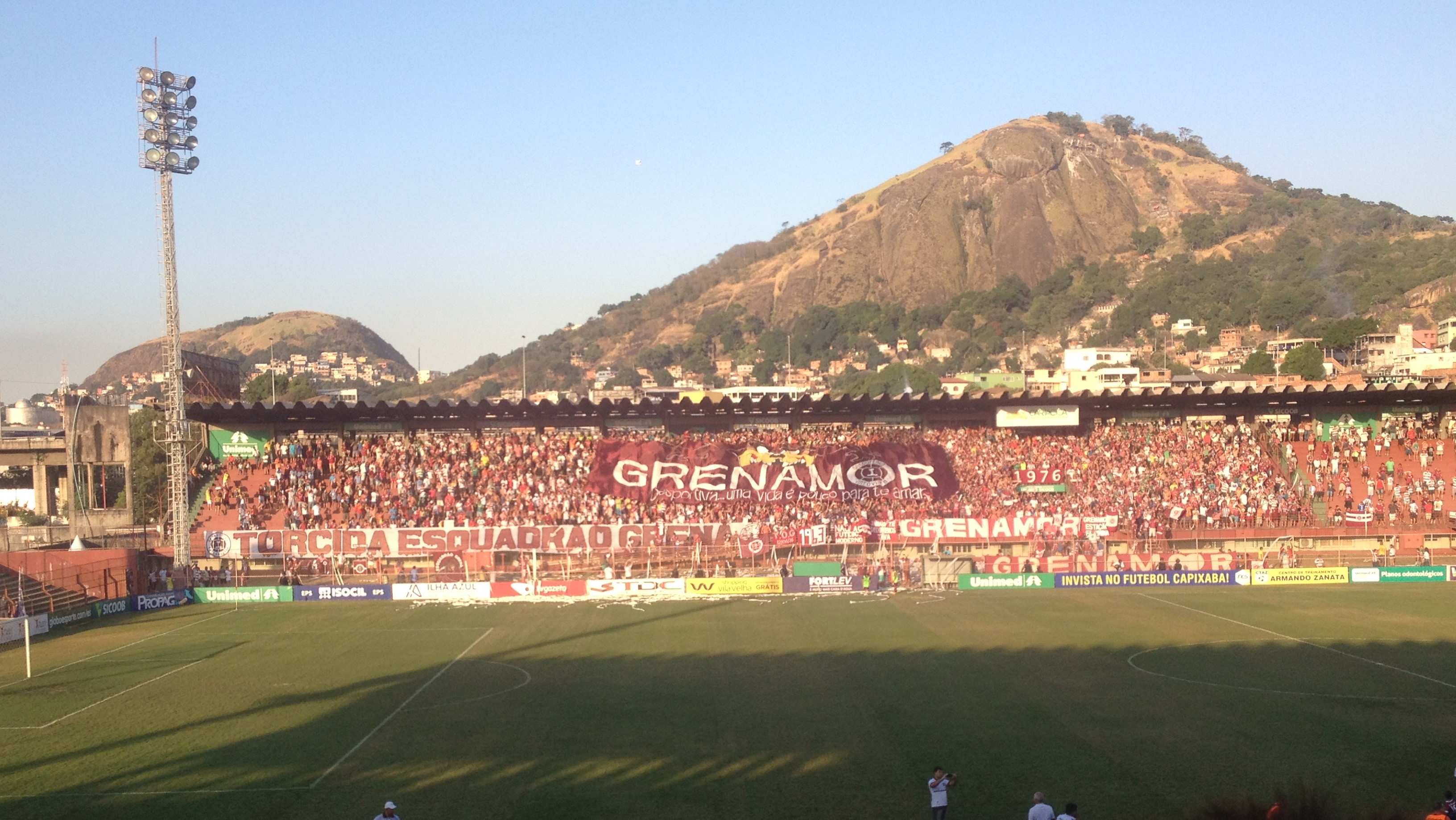 Torcida da Desportiva Ferroviária na Final do Campeonato Capixaba 2016.